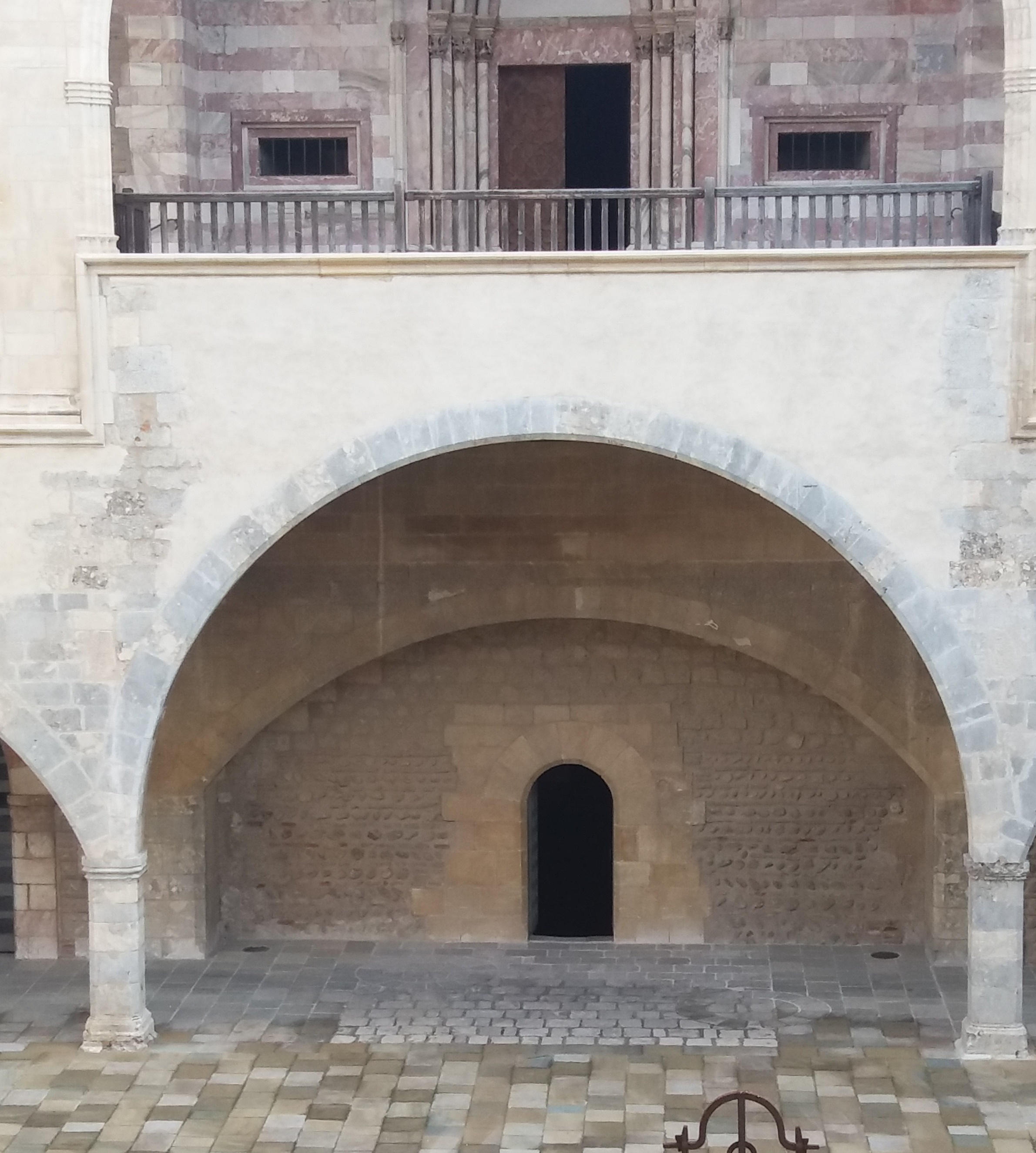 Capella de Santa Maria Magdalena del Palau dels Reis de Mallorca